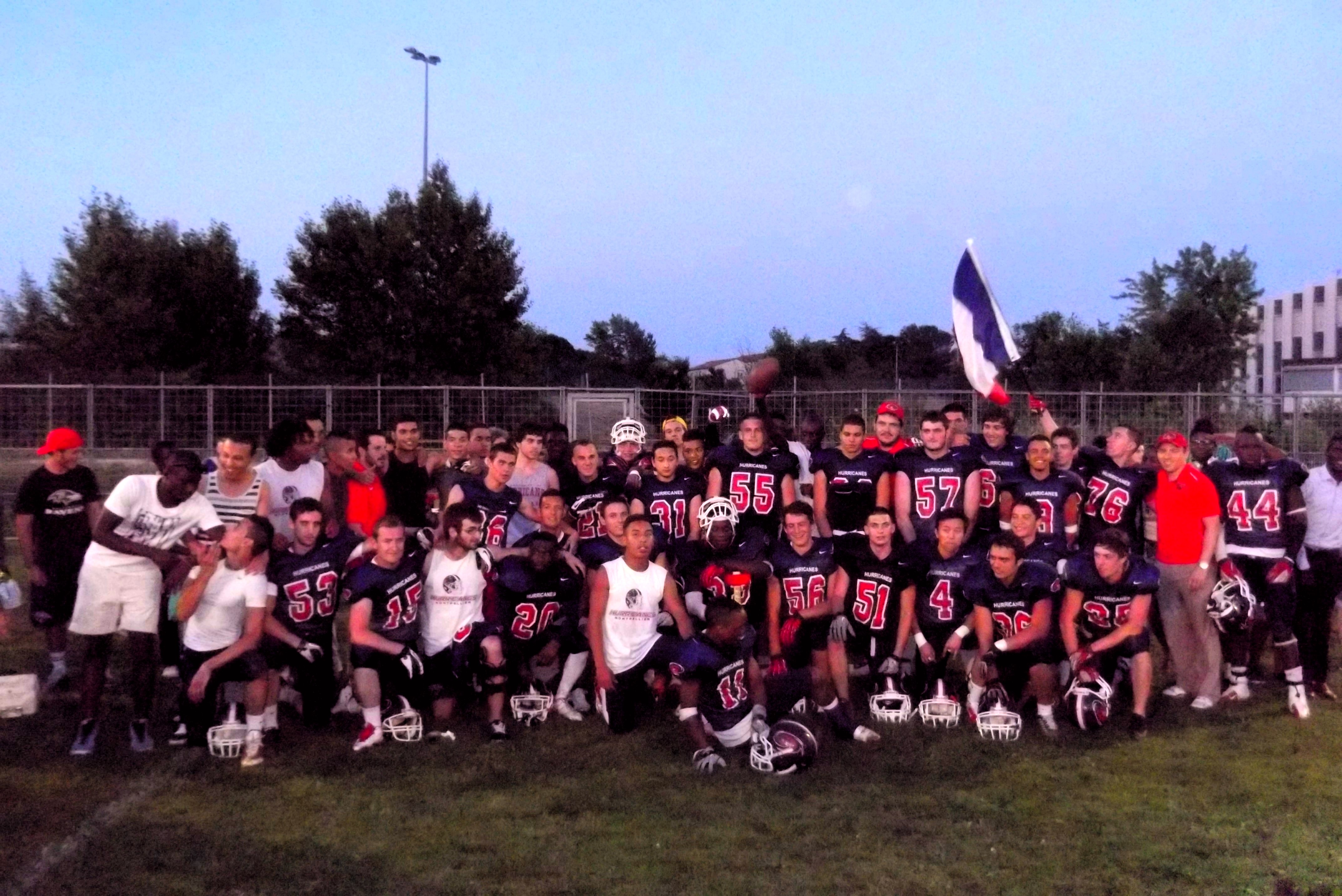 "Hurricanes Montpellier", champions de France juniors 2013, victoire sur les "Chevaliers d'Orléans", 48 à 21.